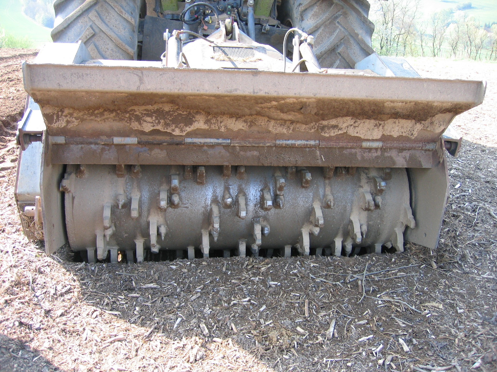 Mulchaggregat